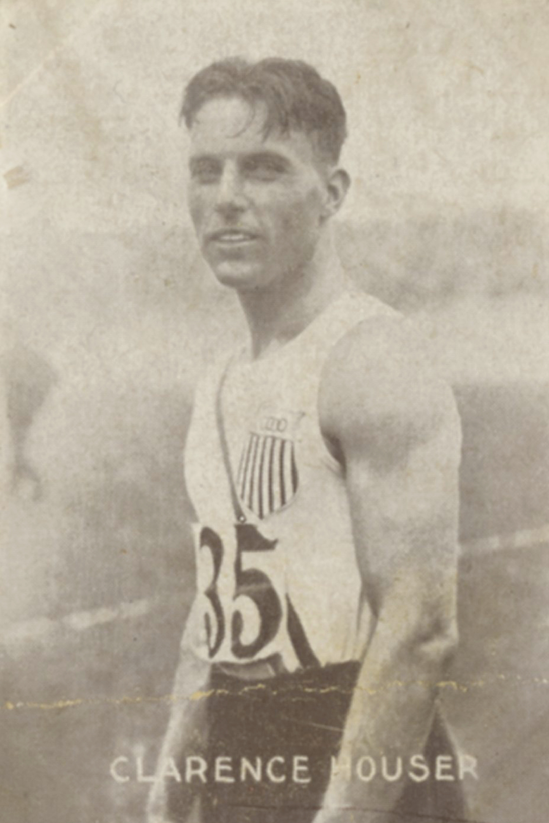 Format: Samlekort Dato / Date: 1928 (fotografiet), ca. 1930 (dokumentet) Fotograf / Photographer: Ukjent Wikipedia: Bud Houser (1901 - 1994) Eier / Owner Institution: Trondheim byarkiv, The Municipal Archives of Trondheim Arkivreferanse / Archive reference: Sportsklubben Freidig: Sigarettfoto ca. 1930 (Løpenr. 75) F23904 Tekst på baksiden: Clarence Houser U. S. A. vandt discoskastet i Amsterdam, med et resultat av 47.32. Han vandt ogsaa discoskast ved forrige Olympiske leke (og tillike kule dengang). Merknad: Disse samlekortene med bilder av norske og internasjonale idretthelter fulgte med i sigarettpakker på 1920 og 30-tallet - derav tobakksreklamen på baksiden. Samlekortene kommer fra Sportsklubben Freidigs arkiv, og inneholder nærmere 90 unike kort pent plassert i et samlealbum. Samleren var den senere skipsmegler Finn Følling (1914 – 1985).